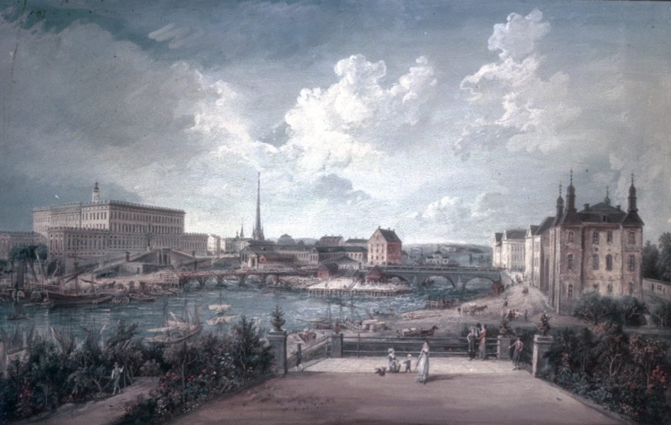 Elias Martin (1739-1818) "Utsikt över Stockholm". Sv:Nationalmuseum, Stockholm.